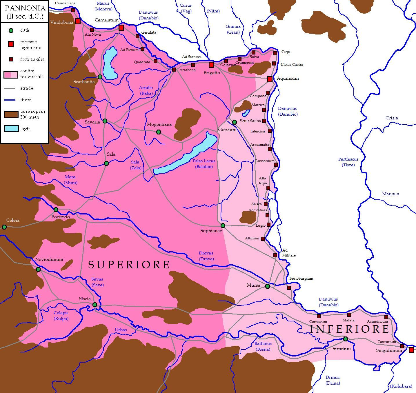 La Pannonia romana nel II secolo d.C. divisa in Superiore ed Inferiore